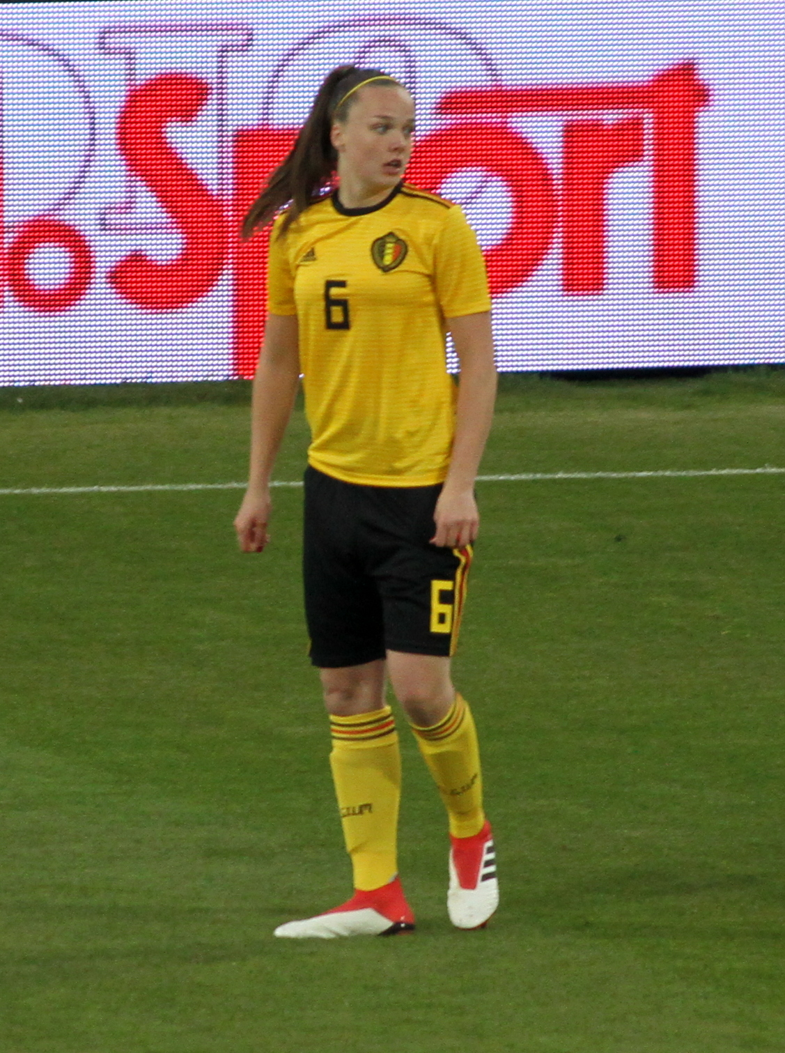 Tine De Caigny, attaccante della nazionale di calcio femminile del Belgio, durante l'incontro Italia-Belgio del 10 aprile 2018 allo stadio Paolo Mazza di Ferrara.